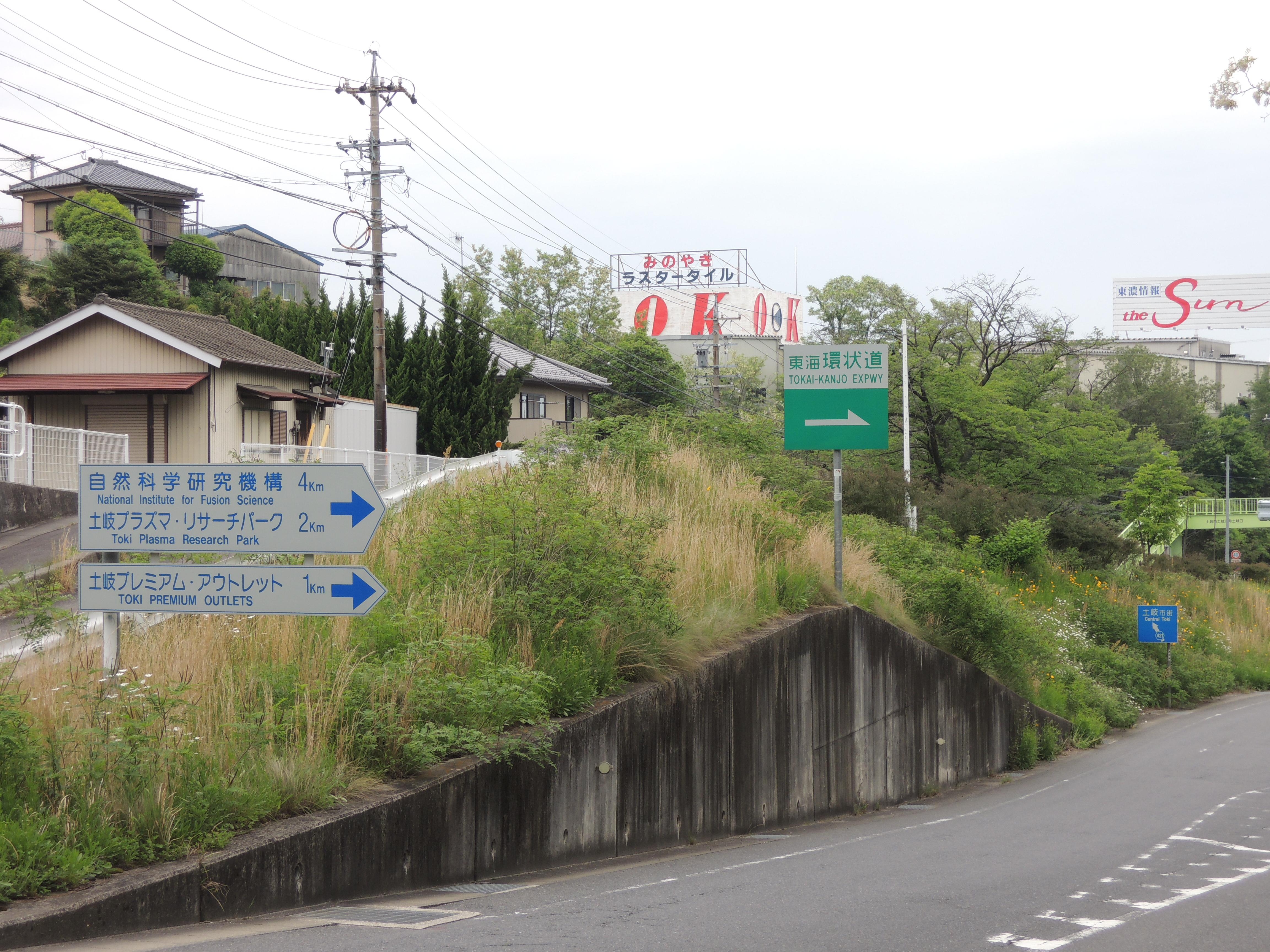 東海環状自動車道 （土岐南多治見インターチェンジ）予告標識（国道19号線下り 神明交差点、岐阜県土岐市）